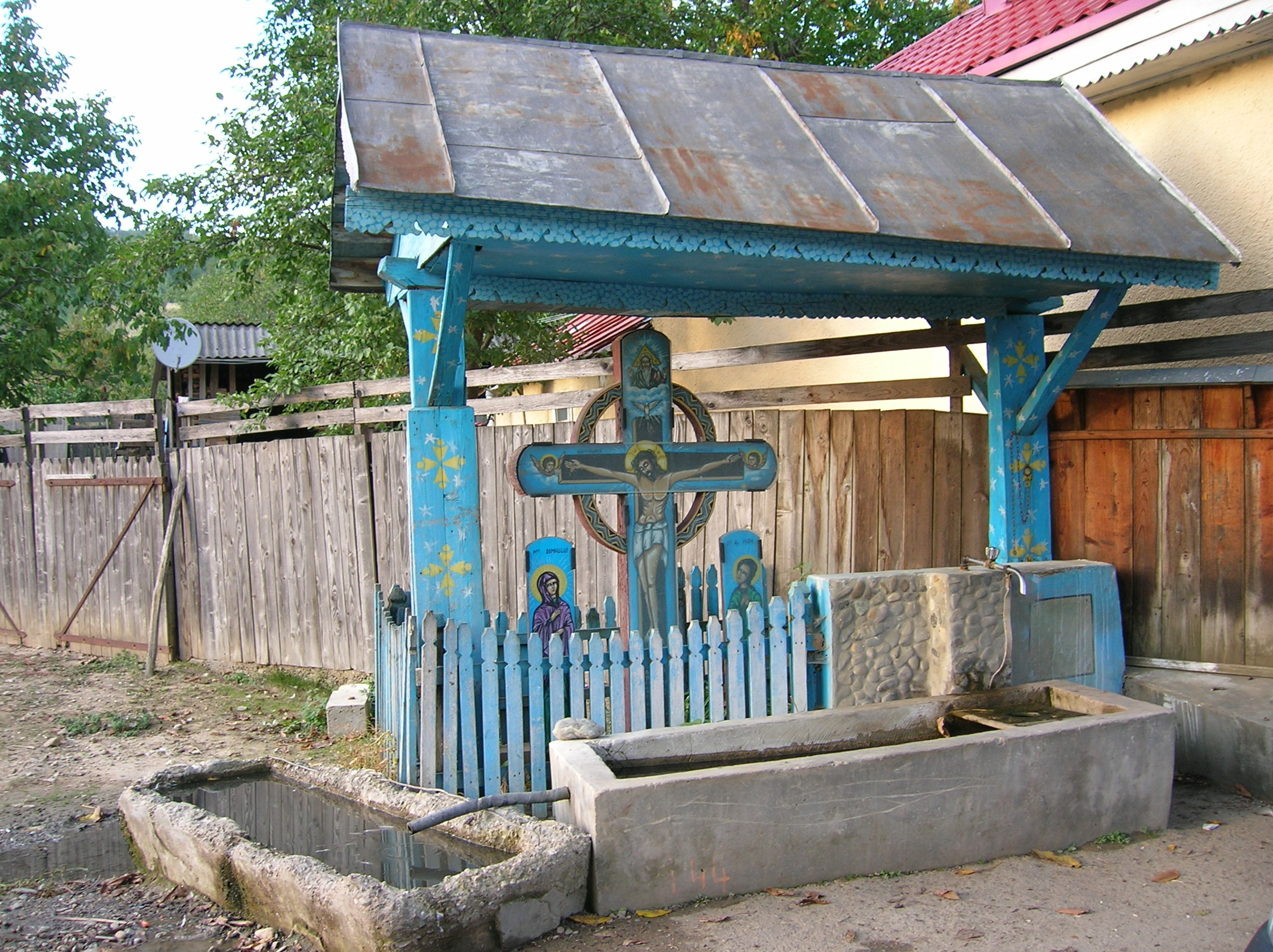 Comuna Valea Seacă Bacău - Troiţă la capătul satului Valea Seacă înspre pădure